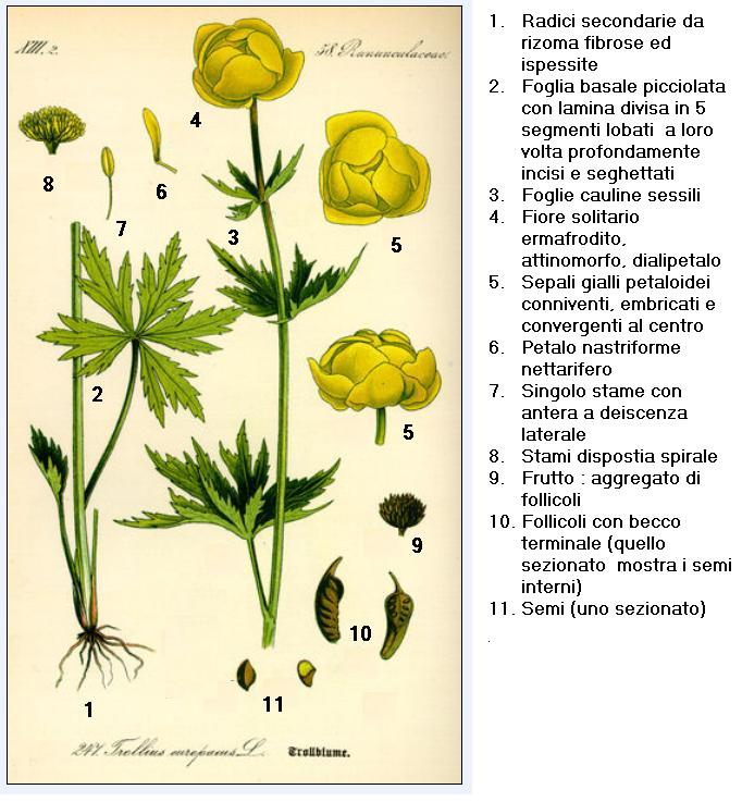 Trollius europaeus